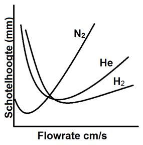 De figuur laat zien hoe de schotelhoogte van verschillende gassen verandert als de flowrate van de mobiele fase toeneemt.